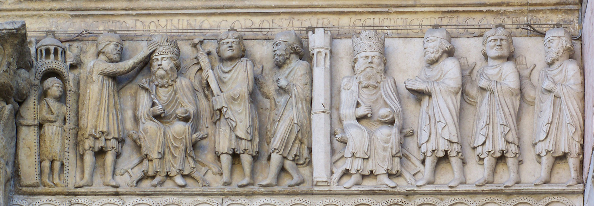 Duomo di Fidenza (provincia di Parma, Italy): bassorilievo con la corte dall'Imperatore Massimiano e San Donnino, situato a sinistra dal portale centrale della cattedrale. XII secolo.